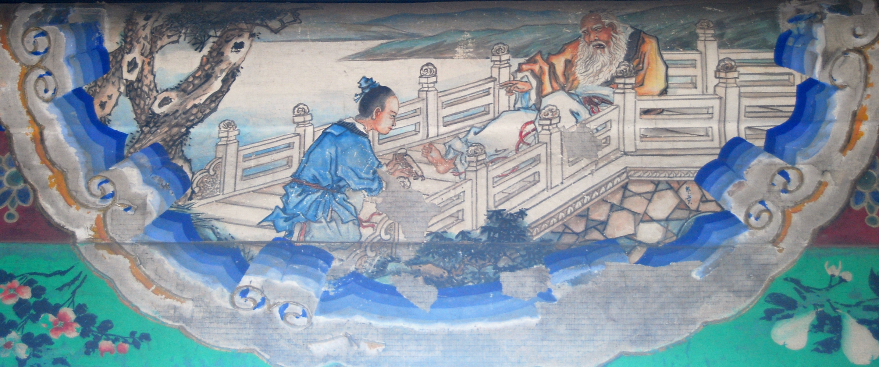 颐和园长廊上的彩绘：张良进履